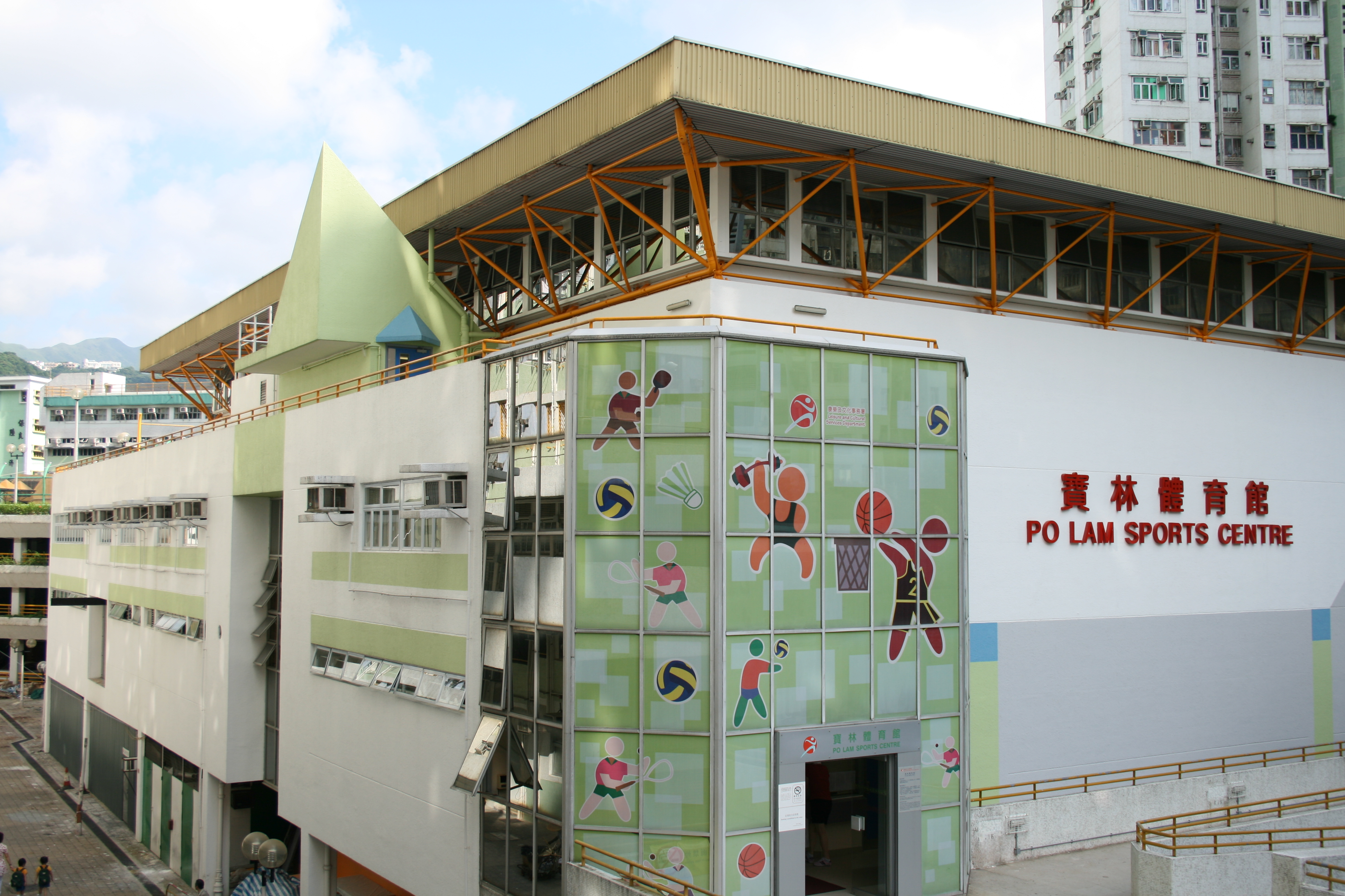 Po Lam Indoor Game Hall將軍澳寶林體育館